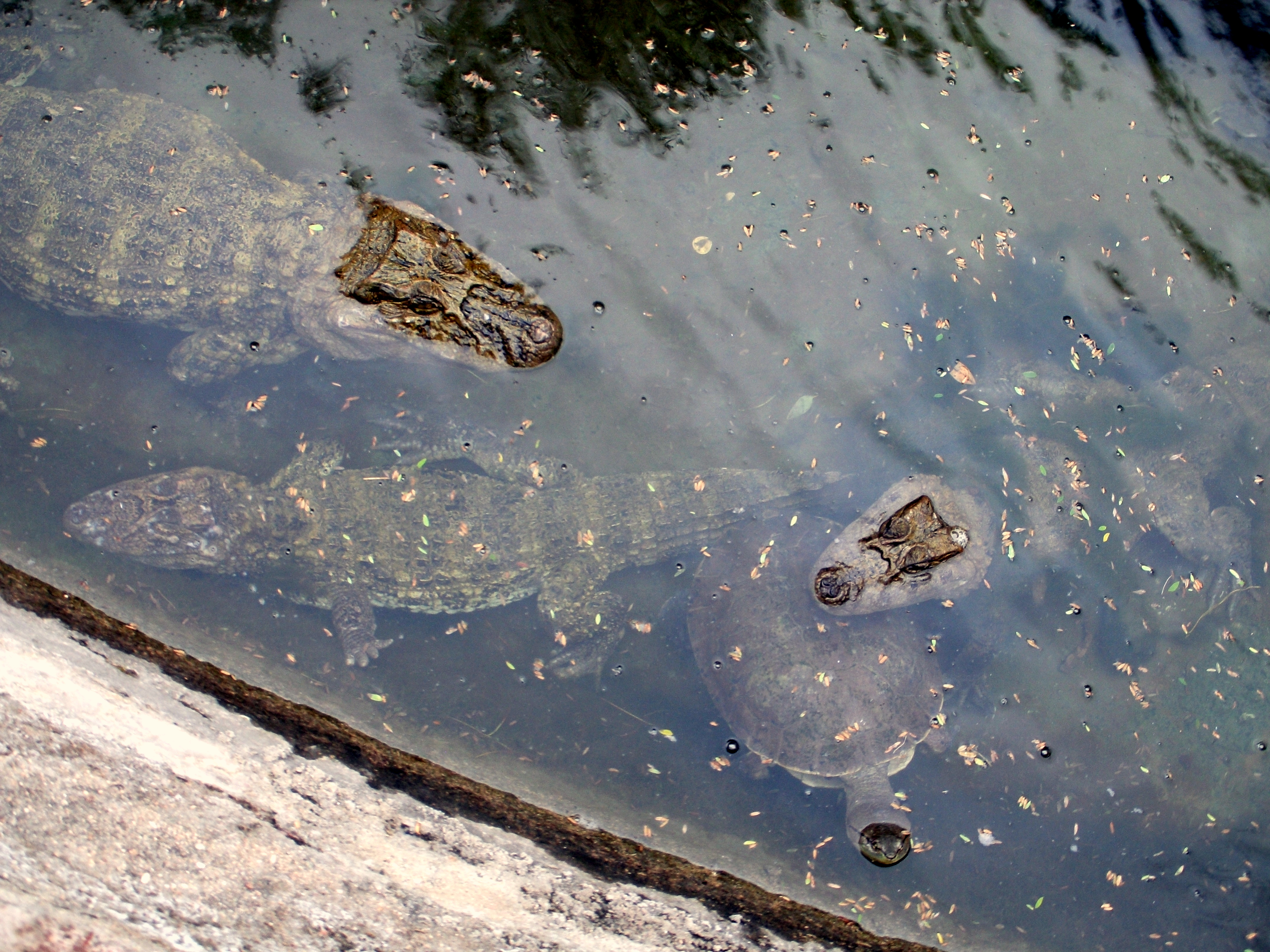 Ejemplar cautivo en el Zoológico de Córdoba.